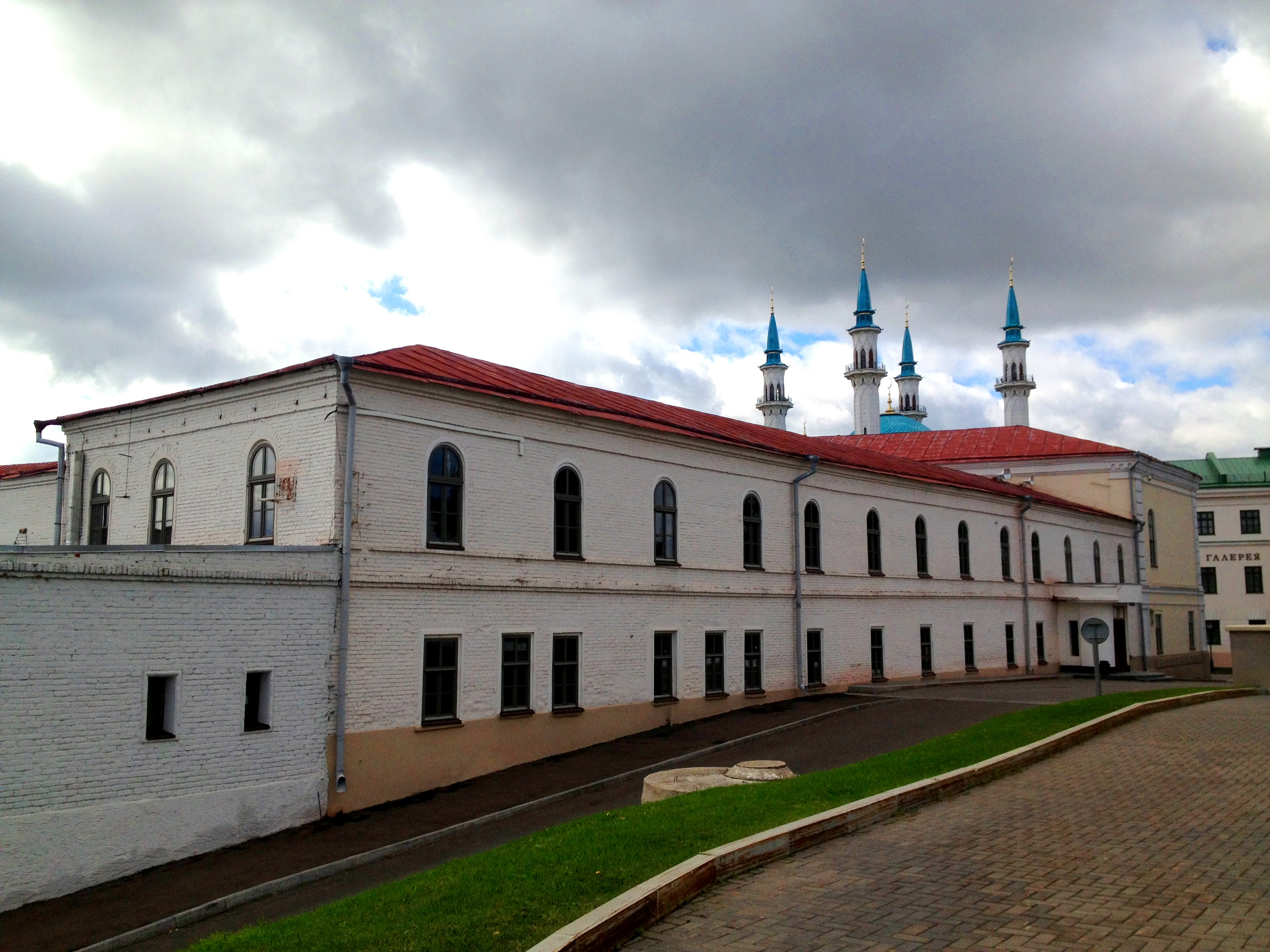 Духовная консистория: Кремль, Казань, Татарстан